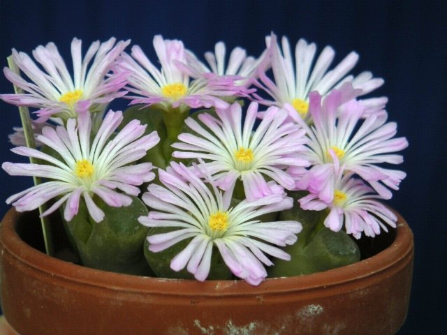 Description : Ophtalmophyllum longum, 12 octobre 2004, collection personnelle Source : Jean-Jacques MILAN Licence : GFDL Jean-Jacques MILAN